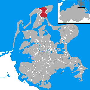 Altenkirchen, Landkreis Rügen, Mecklenburg-Vorpommern